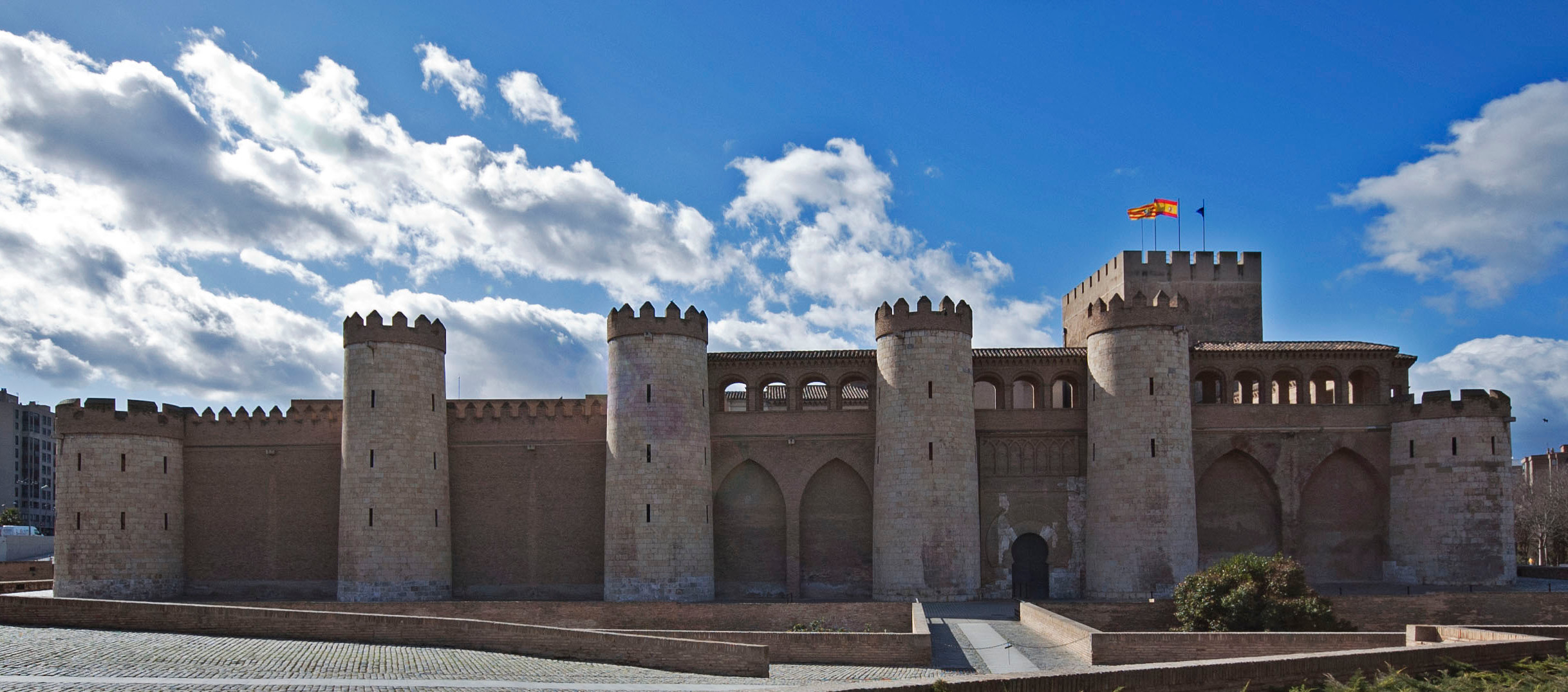 Vista panorámica de La Aljafería (Zaragoza, España)